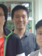 容樂其。《五區公投》第12集，香港人網，2010年4月24日。